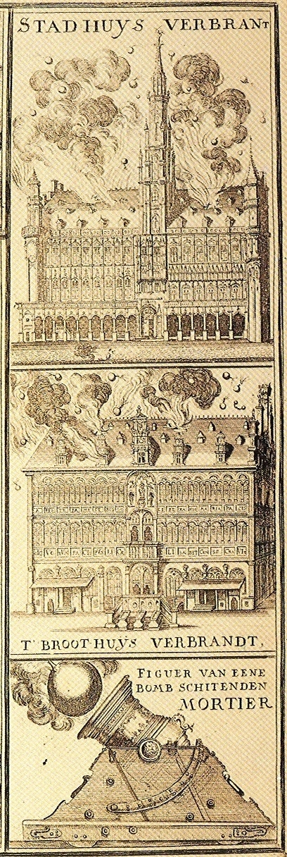 Bombardement et incendie de Bruxelles en 1695 par les troupes françaises de Louis XIV, détail de la carte ’t Ghebombareert ent brandent Brusselen 1695. représentant L'Hôtel de ville en feu, La maison du Roi (halle au pain) en feu, Mortier et bombe incendiaire imprimée à Anvers par Gaspar Bouttats